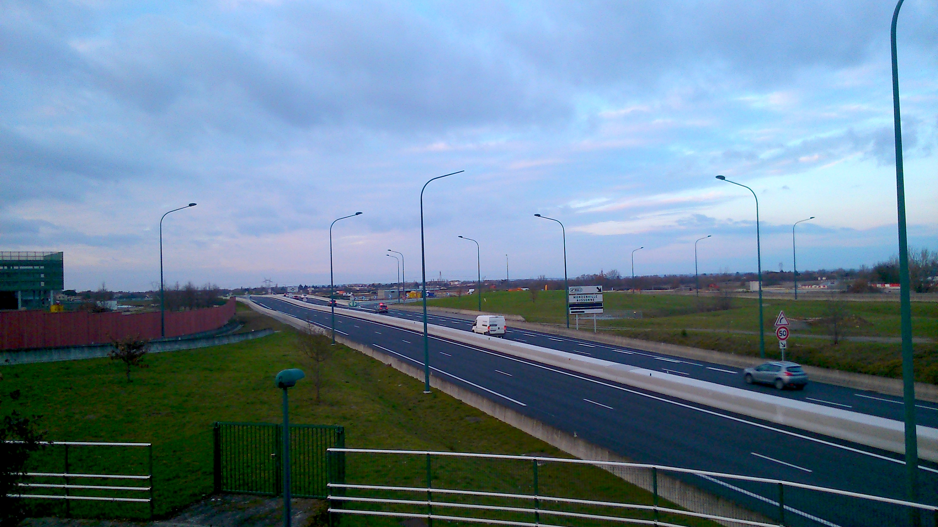 Le prolongement vers le nouveau parc des expositions.